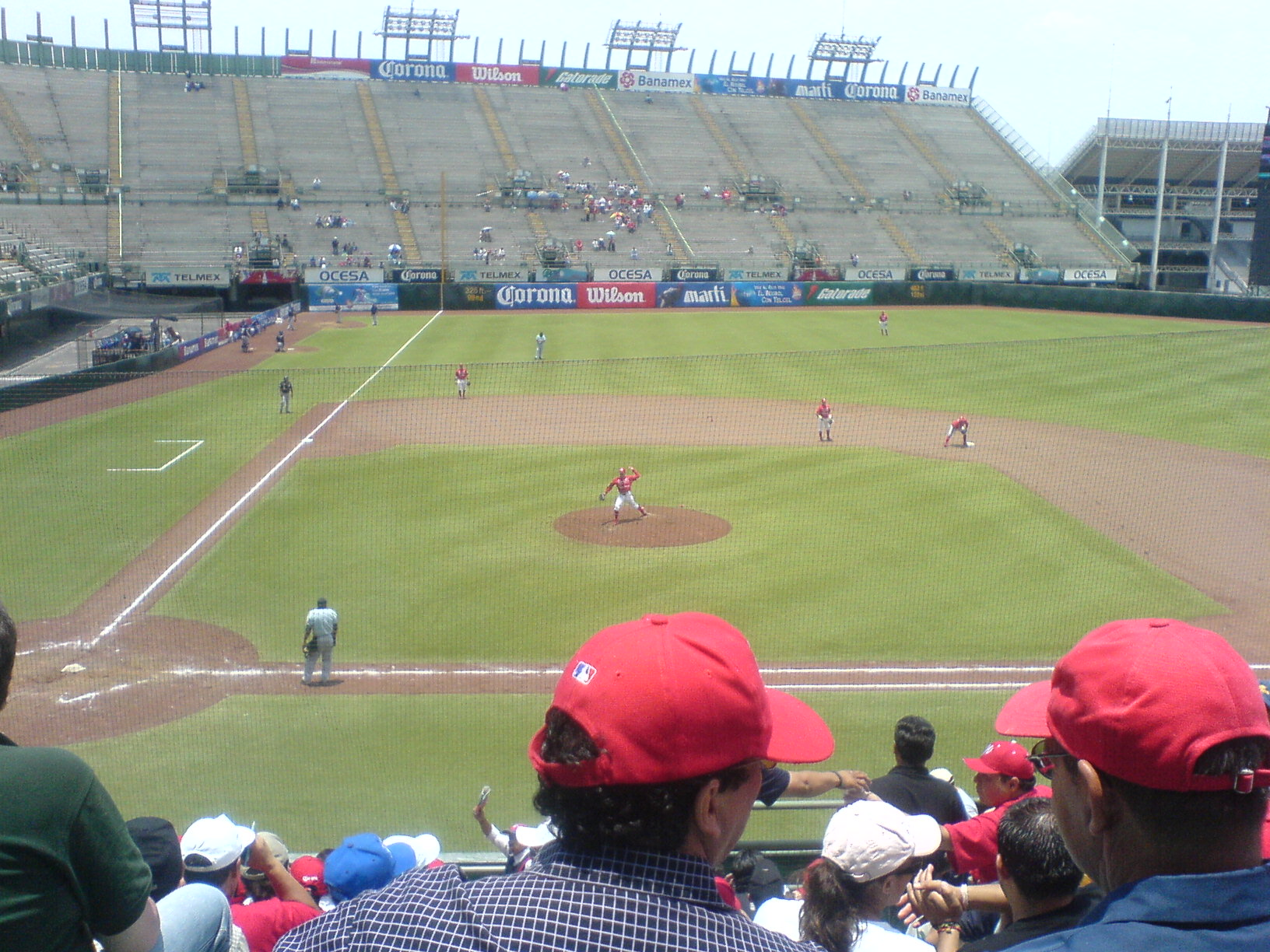 Partido de beisbol entre los Rieleros de Aguascalientes y los Diablos Rojos del México.